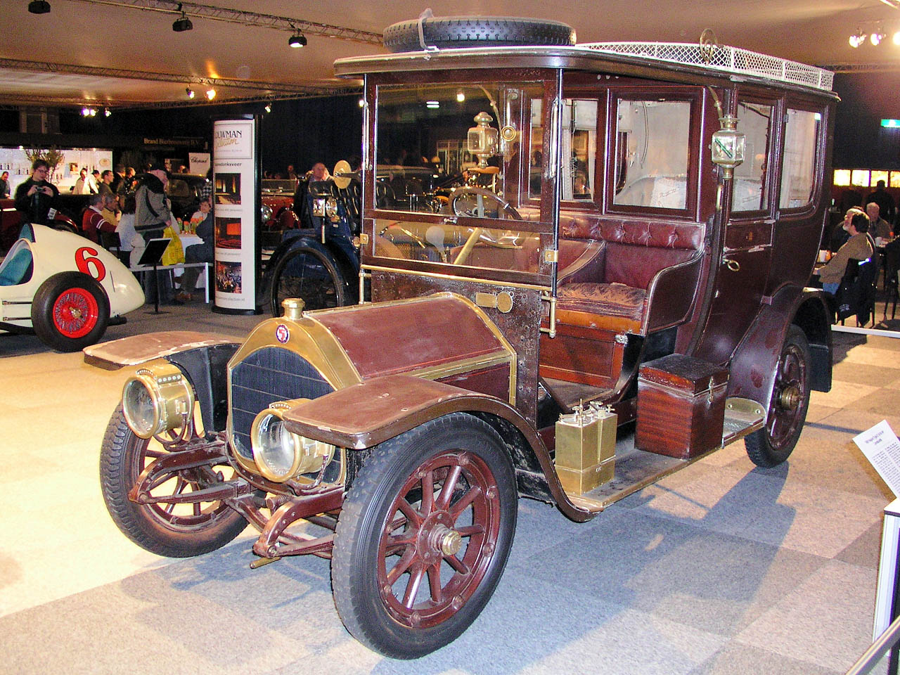 14/16 HP 4-cylinder car designed by Ernst Valentin, made in Belgium by Fabrique d'Armes et d'Automobiles Nagant Frères; front-side view